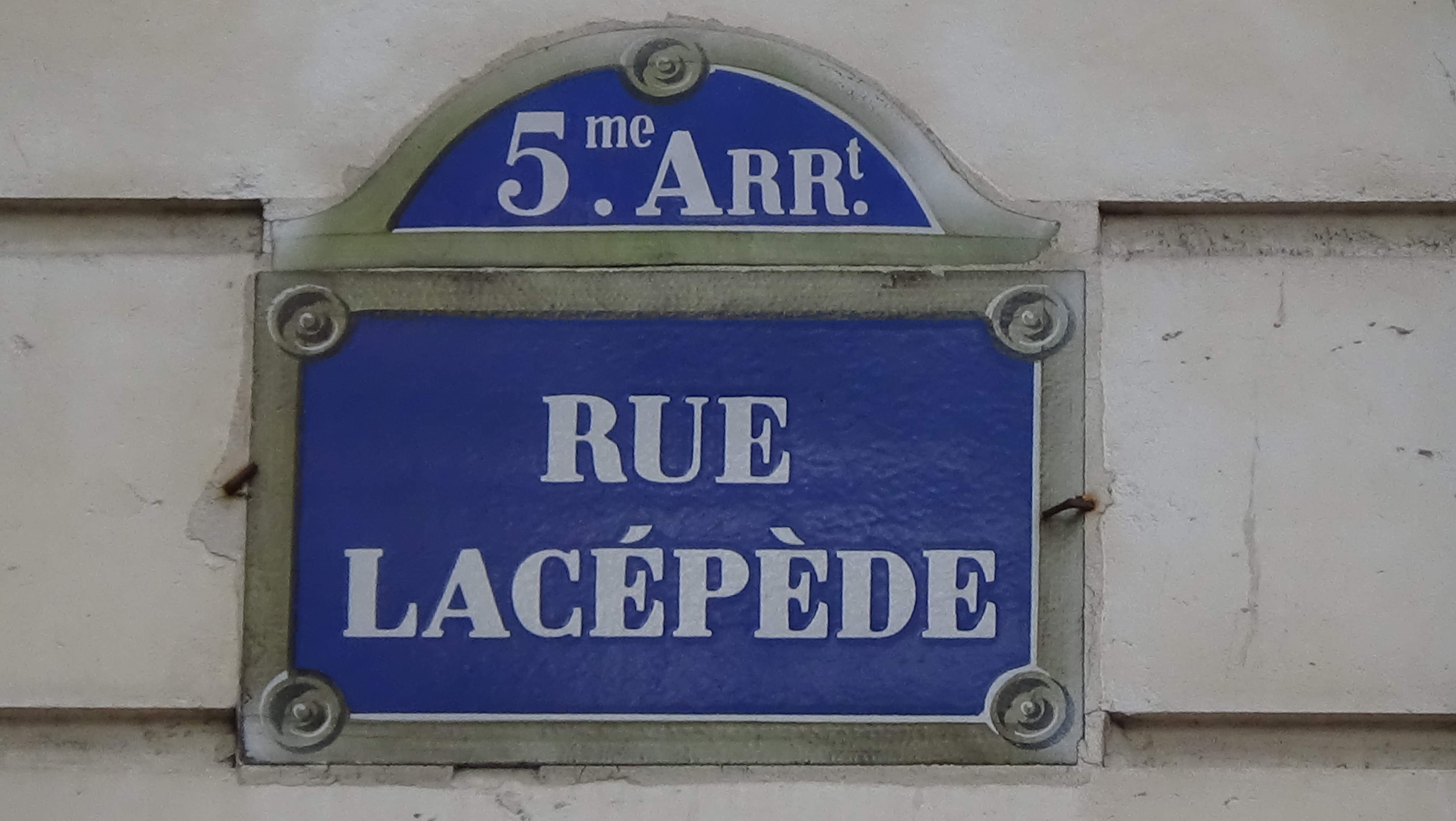 Rue Lacépède - Paris 5ème - (Bernard-Germain de Lacépède)